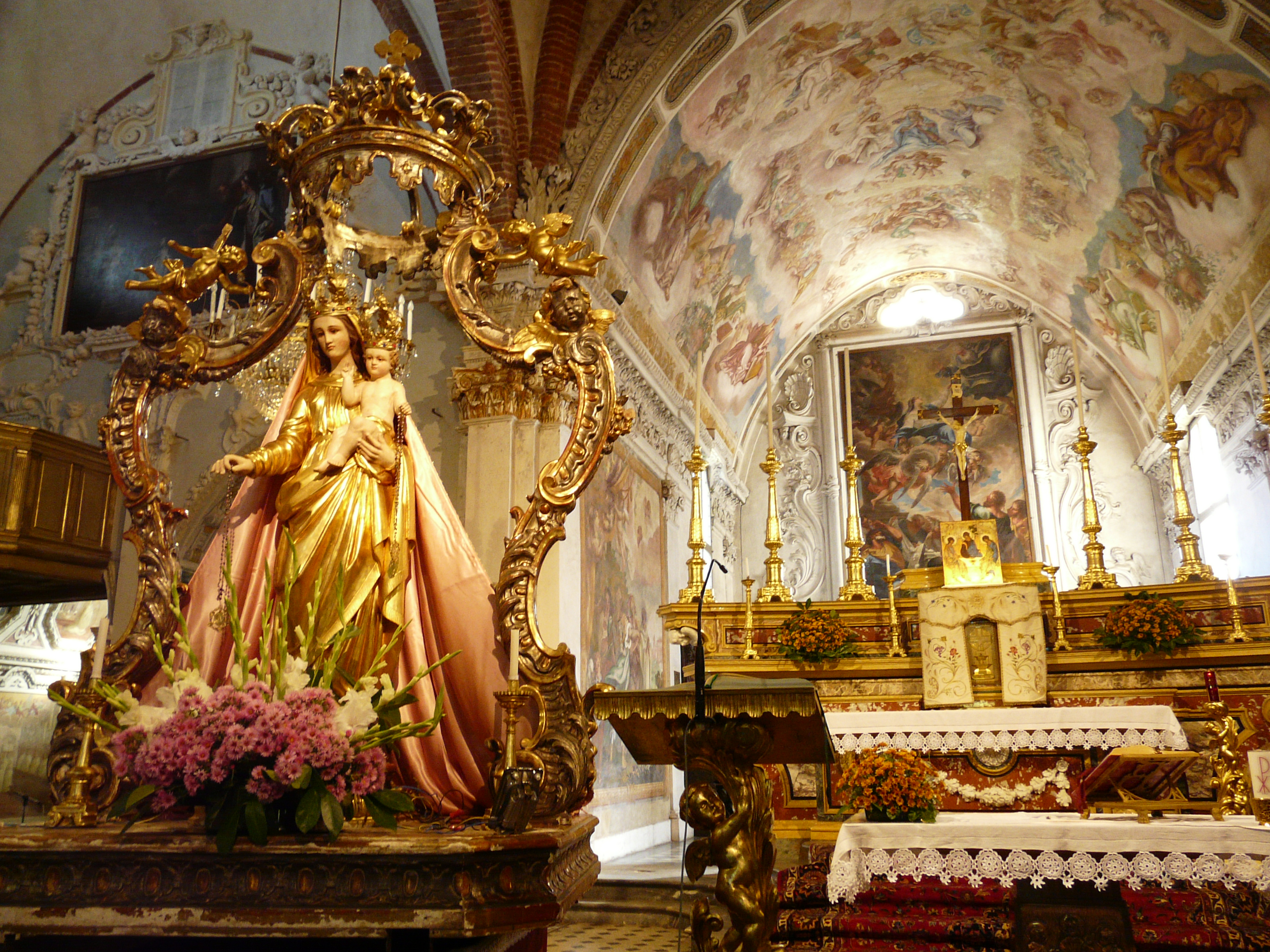 Altare maggiore e statua Madonna dell'abbazia di Santa Maria di Casanova, frazione di Casanova, Carmagnola, Piemonte, Italia